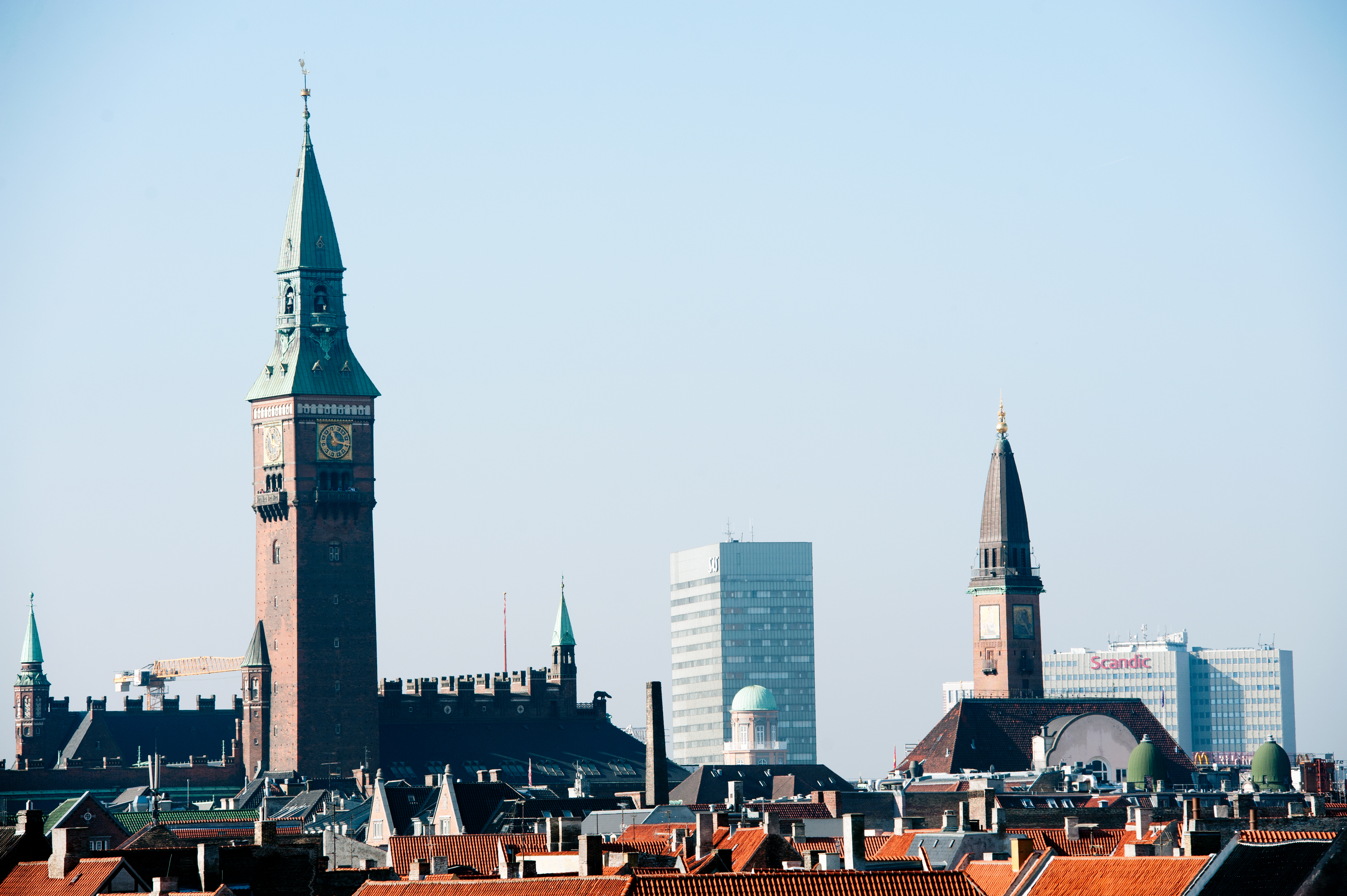 Köpenhamn Danmark Data-uid: cfd3dae5-3d29-4471-961b-15264ee9756e